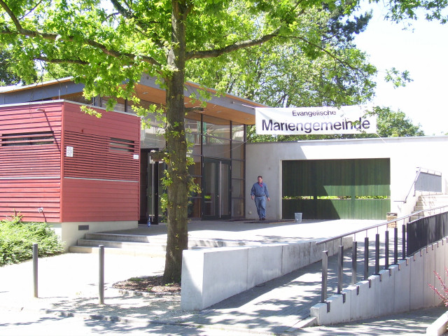 ev. Gemeindehaus der Marienkirche in Seckbach